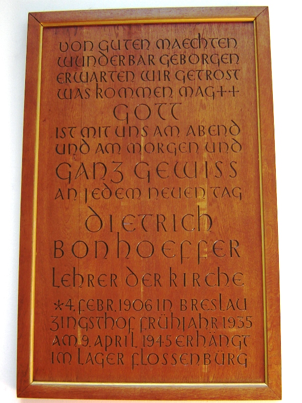 Zingsthof Bonhoeffertafel, Zingst (Mecklenburg-Vorpommern)